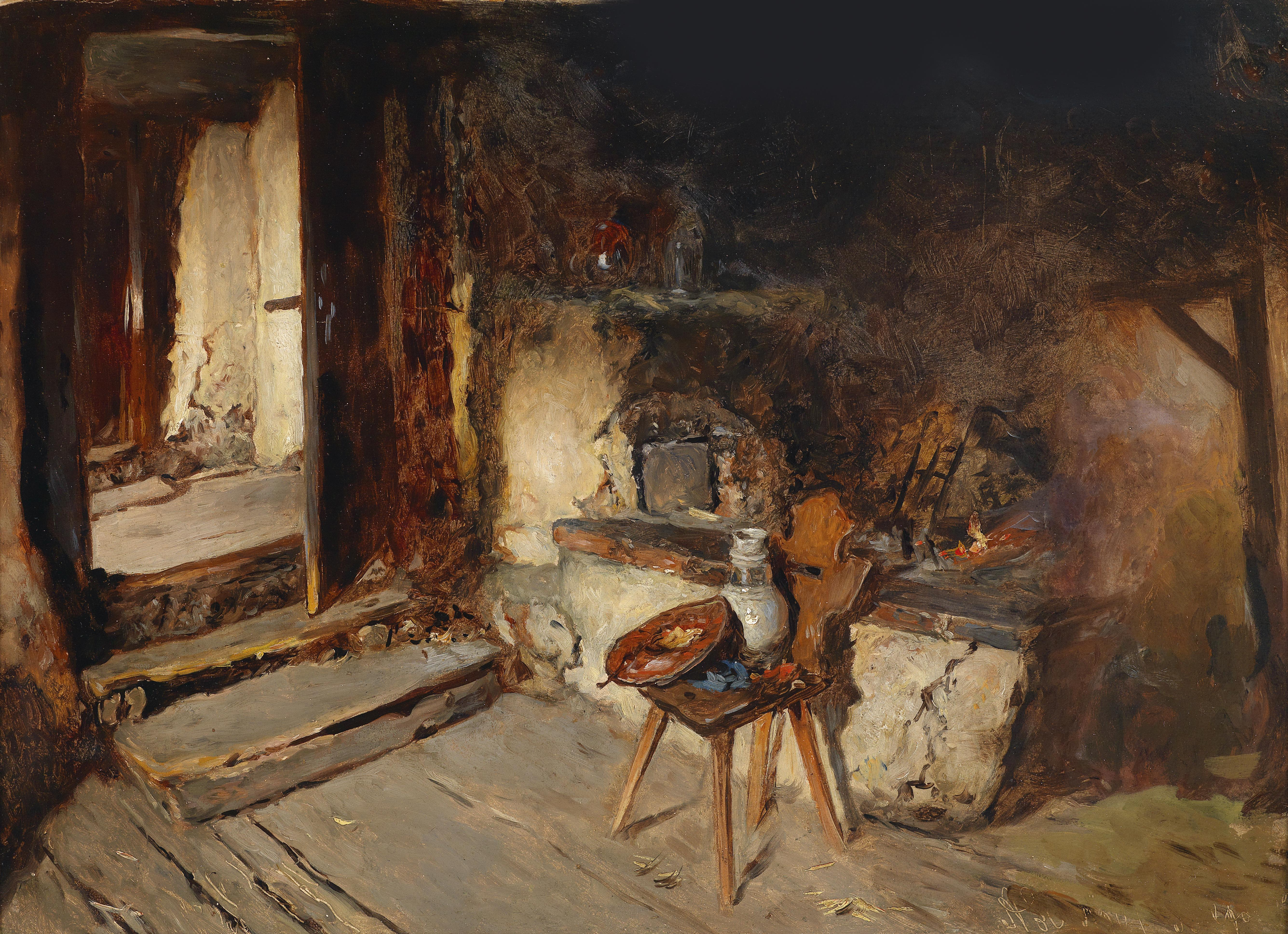 Rauchkuchltitle QS:P1476,de:"Rauchkuchl" label QS:Lde,"Rauchkuchl"